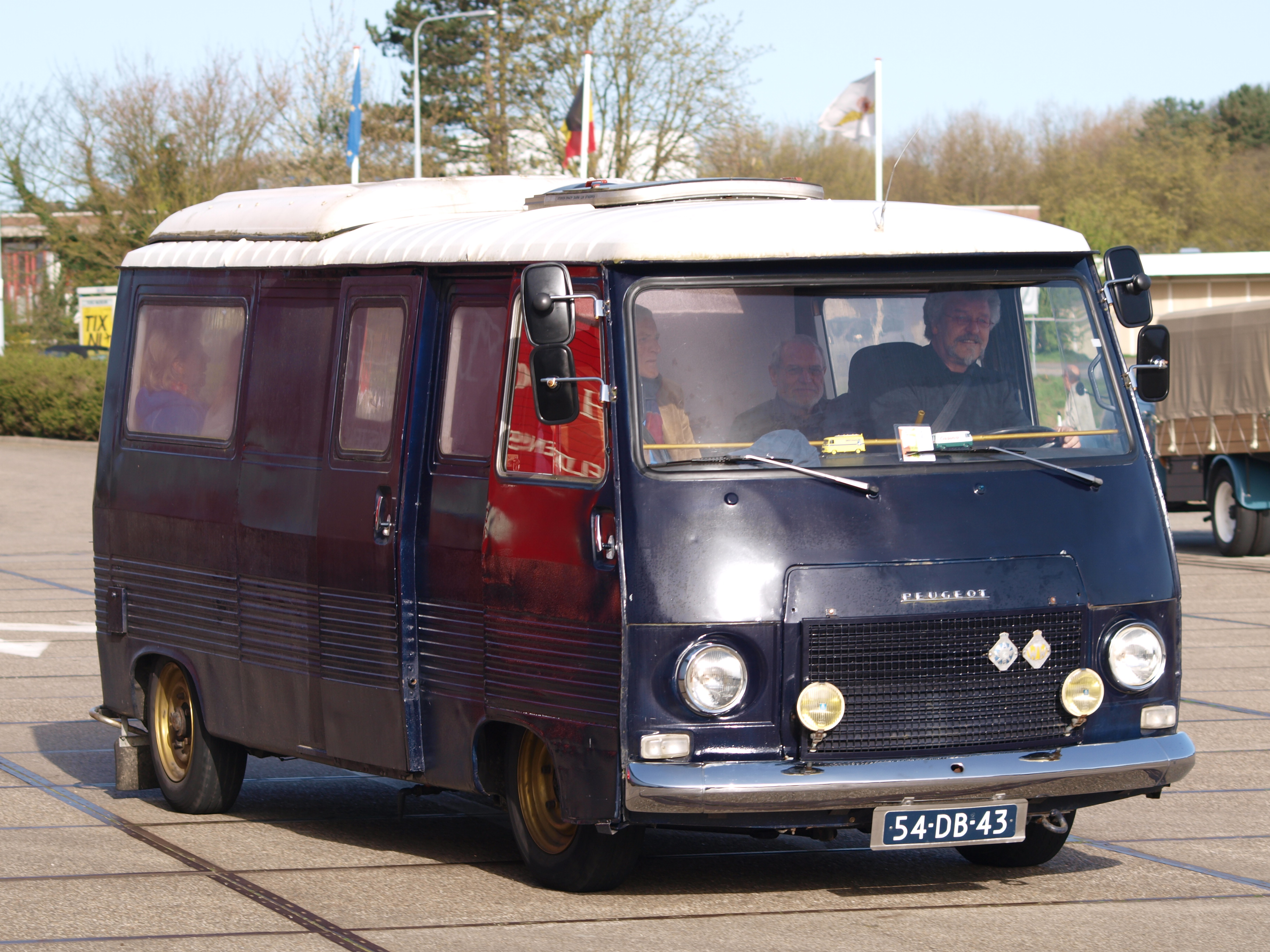 1978 Peugeot J7PZ50